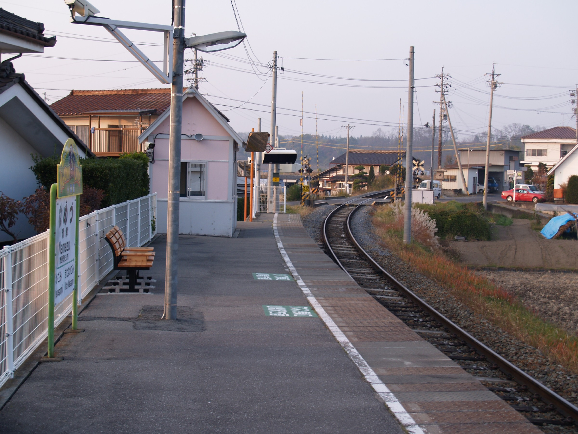 滑津駅ホーム